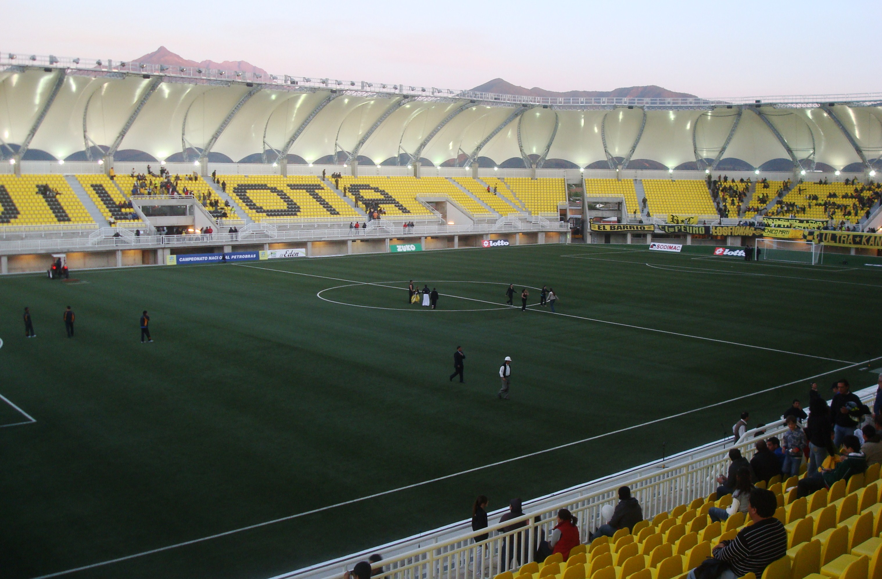 Estadio Bicentenario Lucio Fariña Fernández, Quillota, Chile